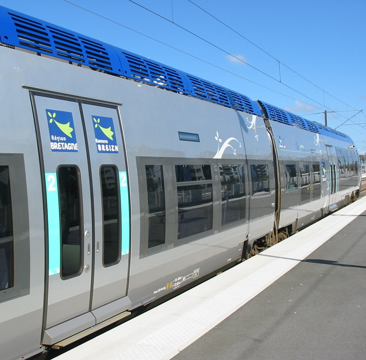 Train, Saint-Malo Nrf: Train, Saint Mâlo